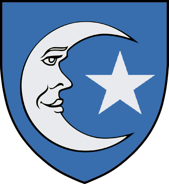 Vapensköld för adelsätten Slatte nummer 97